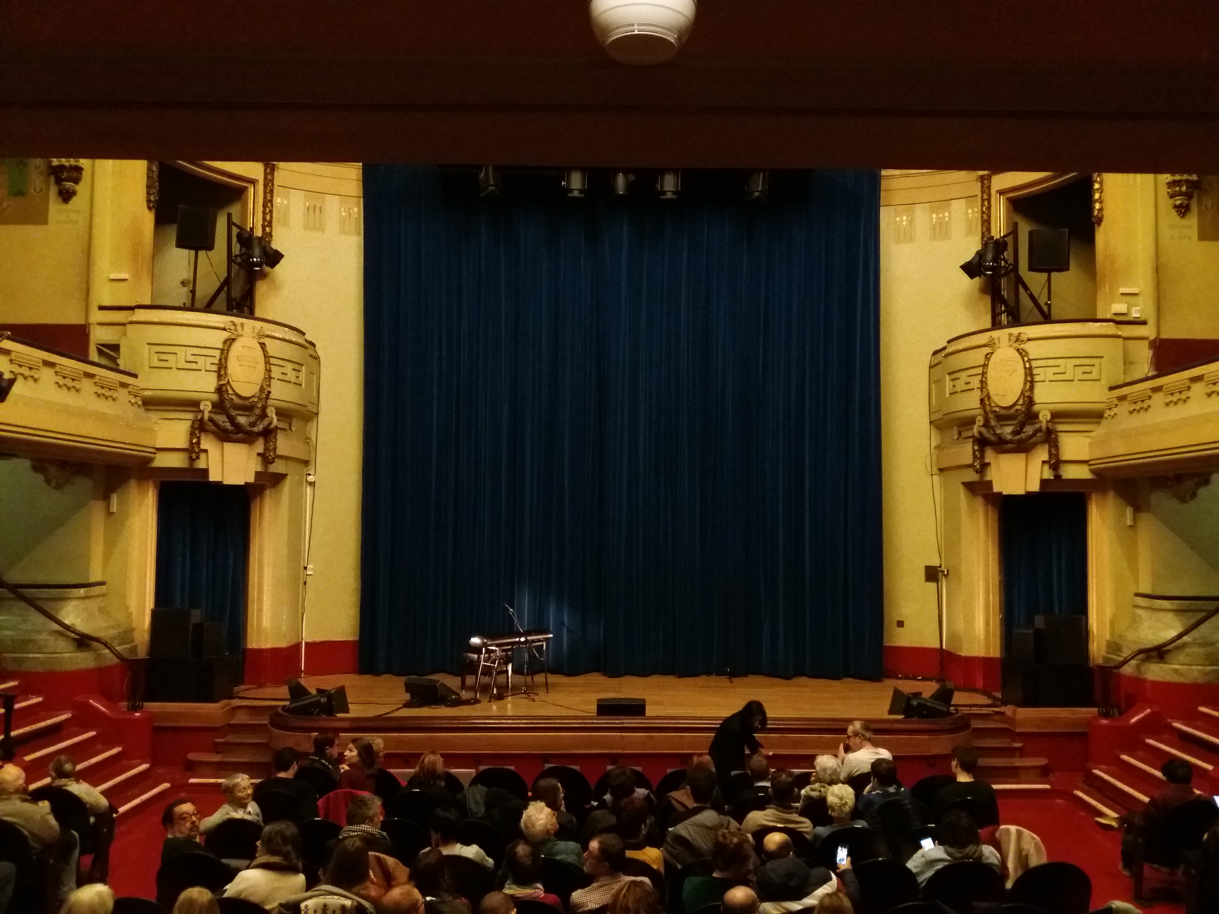 Scène vue depuis l'entrée.